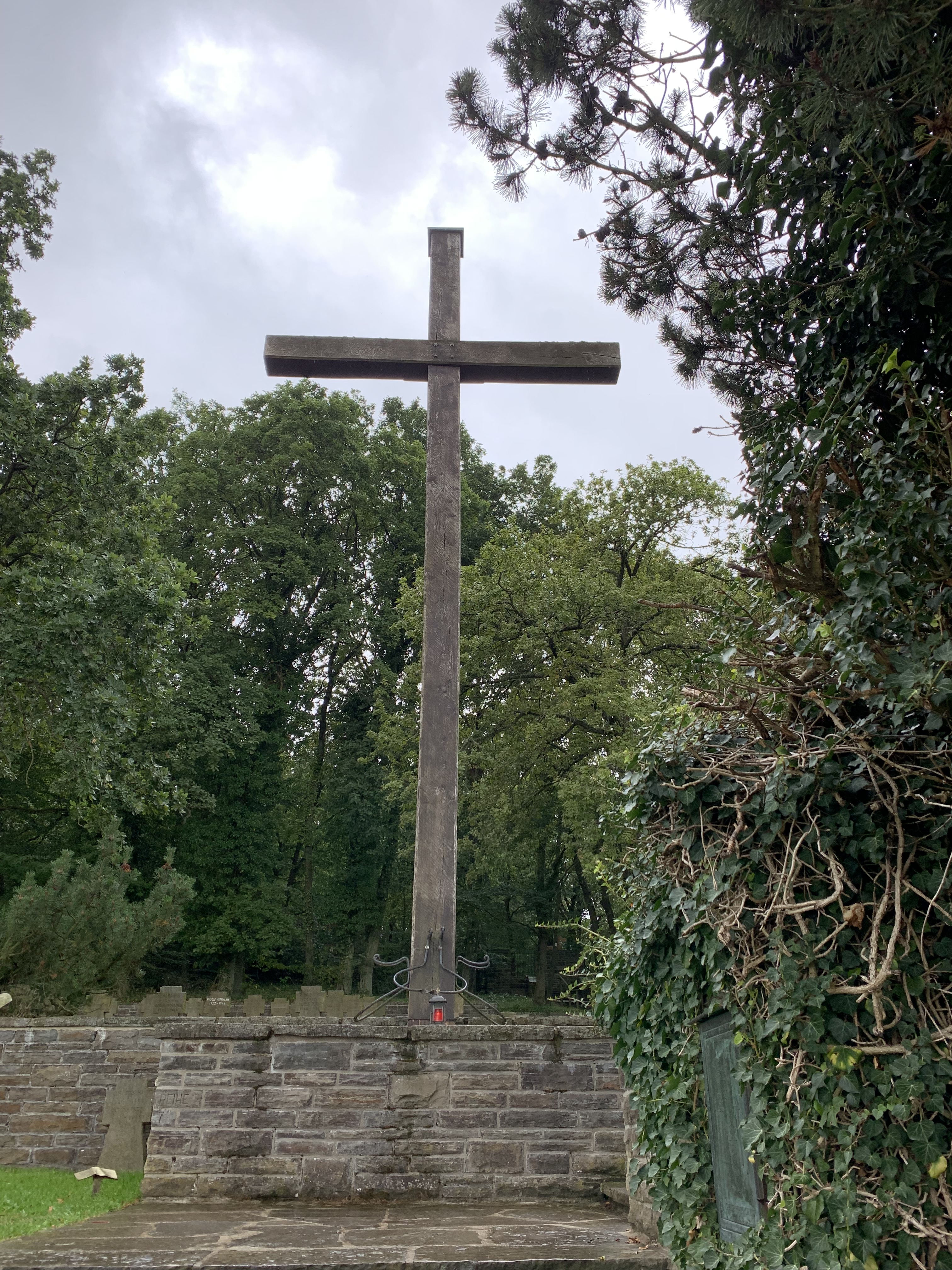 Die Kriegsgräberstätte Heimbach ist eine Kriegsgräberstätte in Heimbach im Kreis Düren in Nordrhein-Westfalen. Dort liegen 414 Gefallene aus dem Zweiten Weltkrieg.